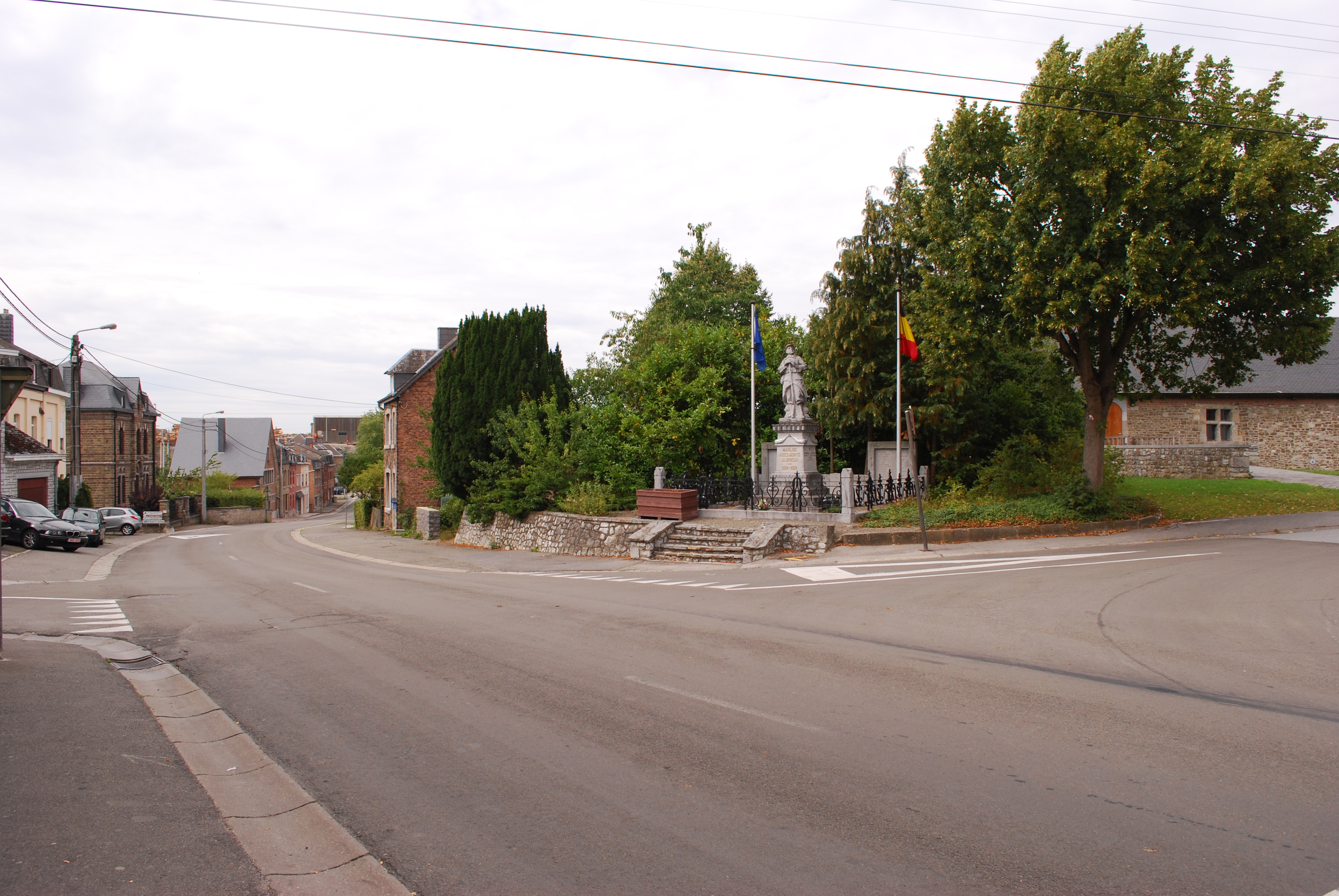 Le monument aux morts des deux guerres, dans la rue de la Station à Marloie.